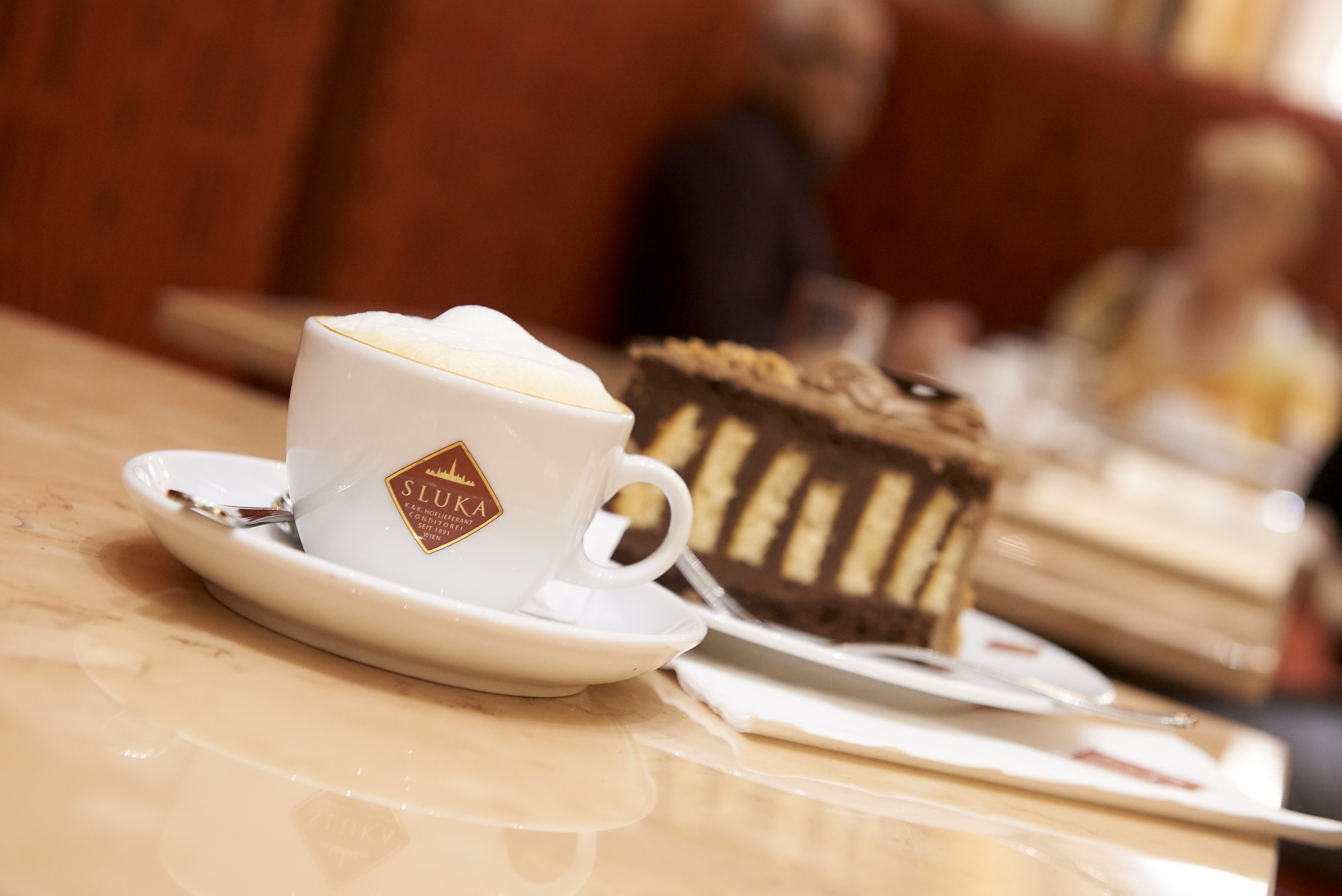 Conditorei Sluka am Rathausplatz und in der Kärntner Straße - Traditionelle Wiener Kaffeehauskultur